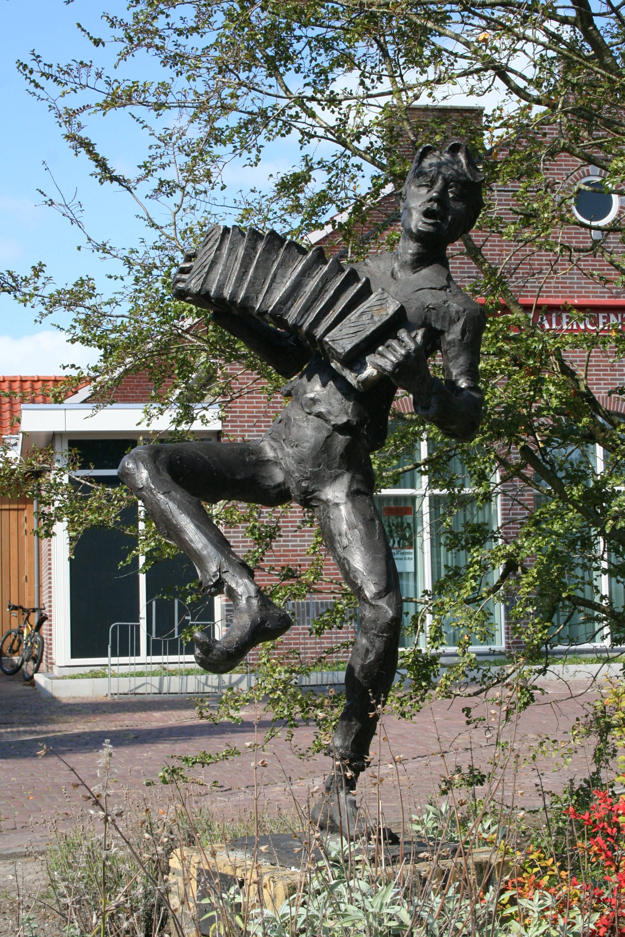 Frits Stoop,1995